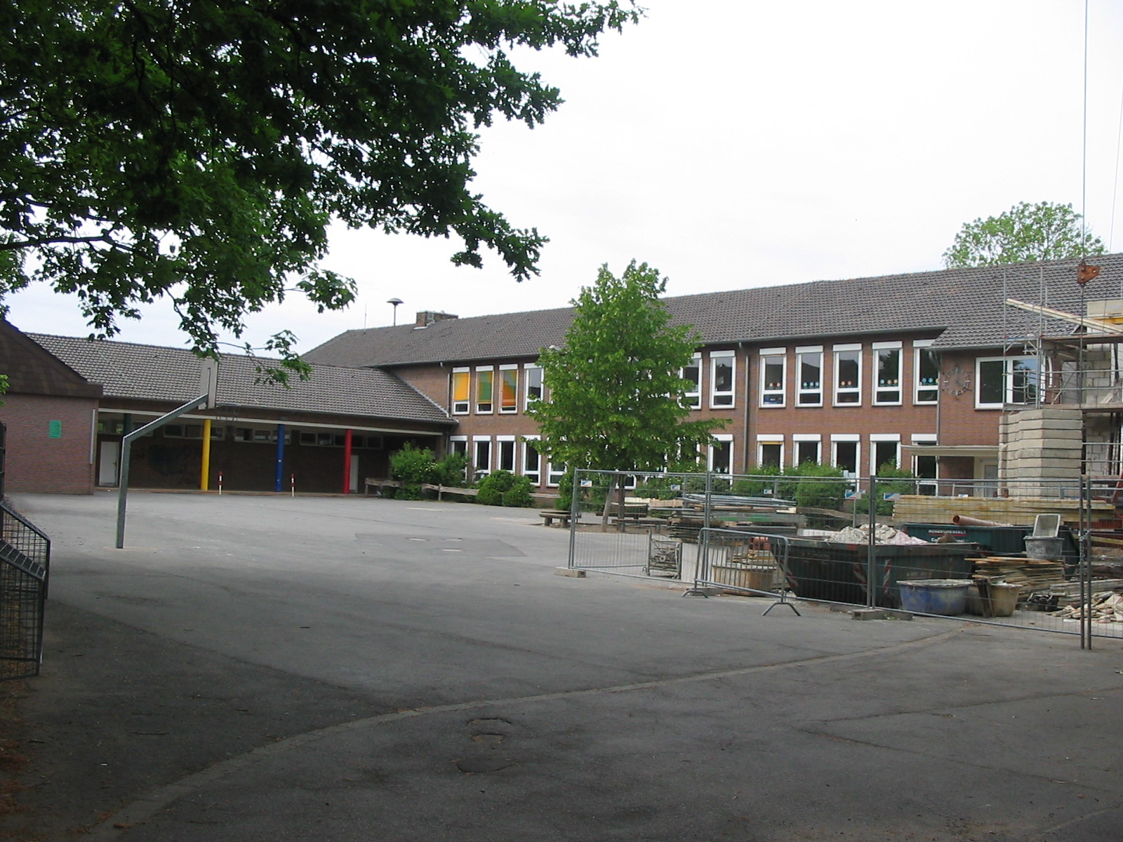 Overberggrundschule, Rhede (Westfalen)